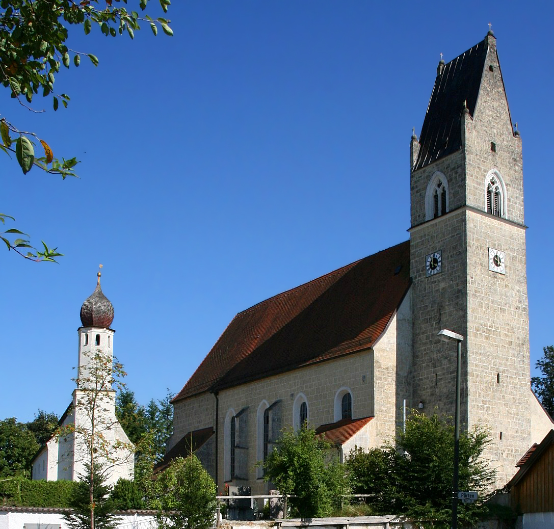 Die katholische Pfarr- und Wallfahrtskirche St. Mariä Himmelfahrt in Pürten (Stadt Waldkraiburg, Landkreis Mühldorf am Inn, Oberbayern). Eines der schönsten und bedeutendsten Gotteshäuser des Landkreises. Die Kirche ist rechts im Bild, links die Friedhofskapelle.